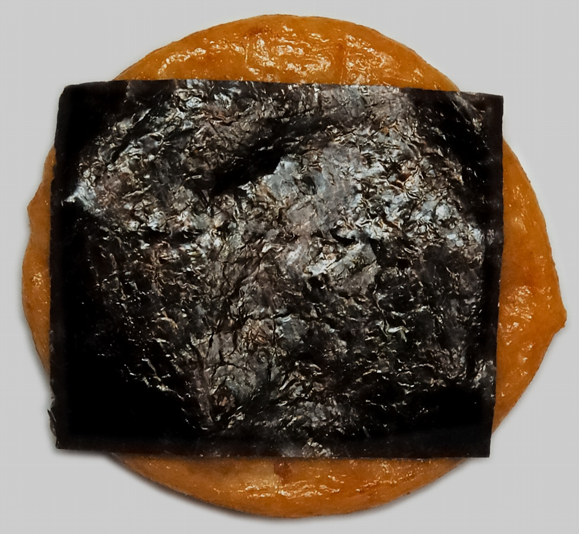 Senbei,black one is Nori. (煎餅、煎餅の上にある黒い物はja:海苔である。)